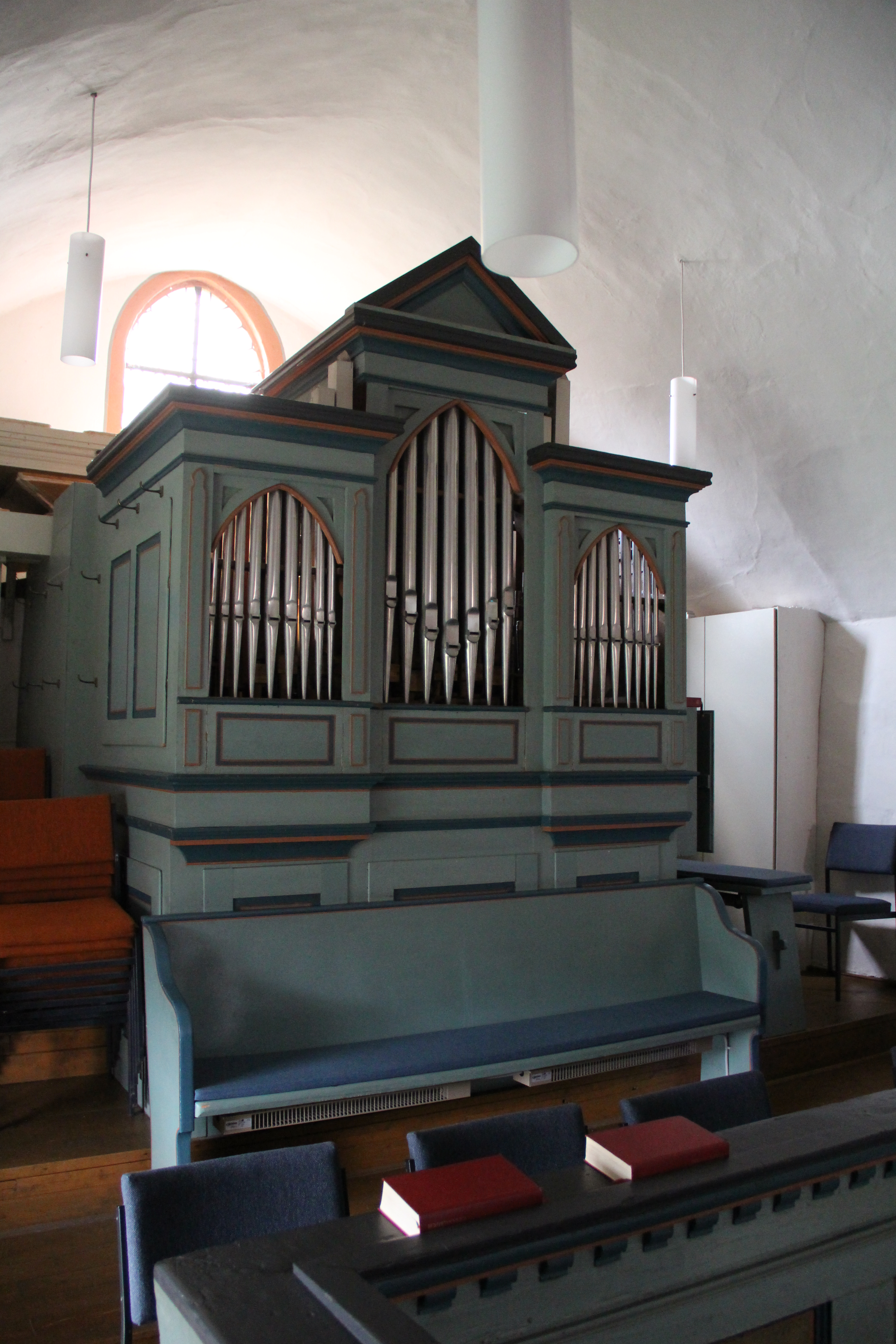 Ev Kirche Kirchvers (Lohra)